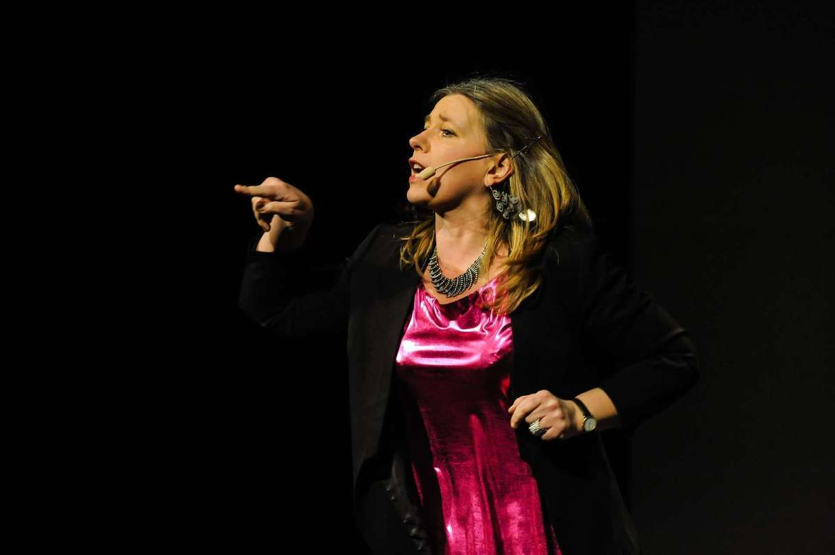 Ami under SVT-inspelningen av "Ladies Fight" på Södra Teatern